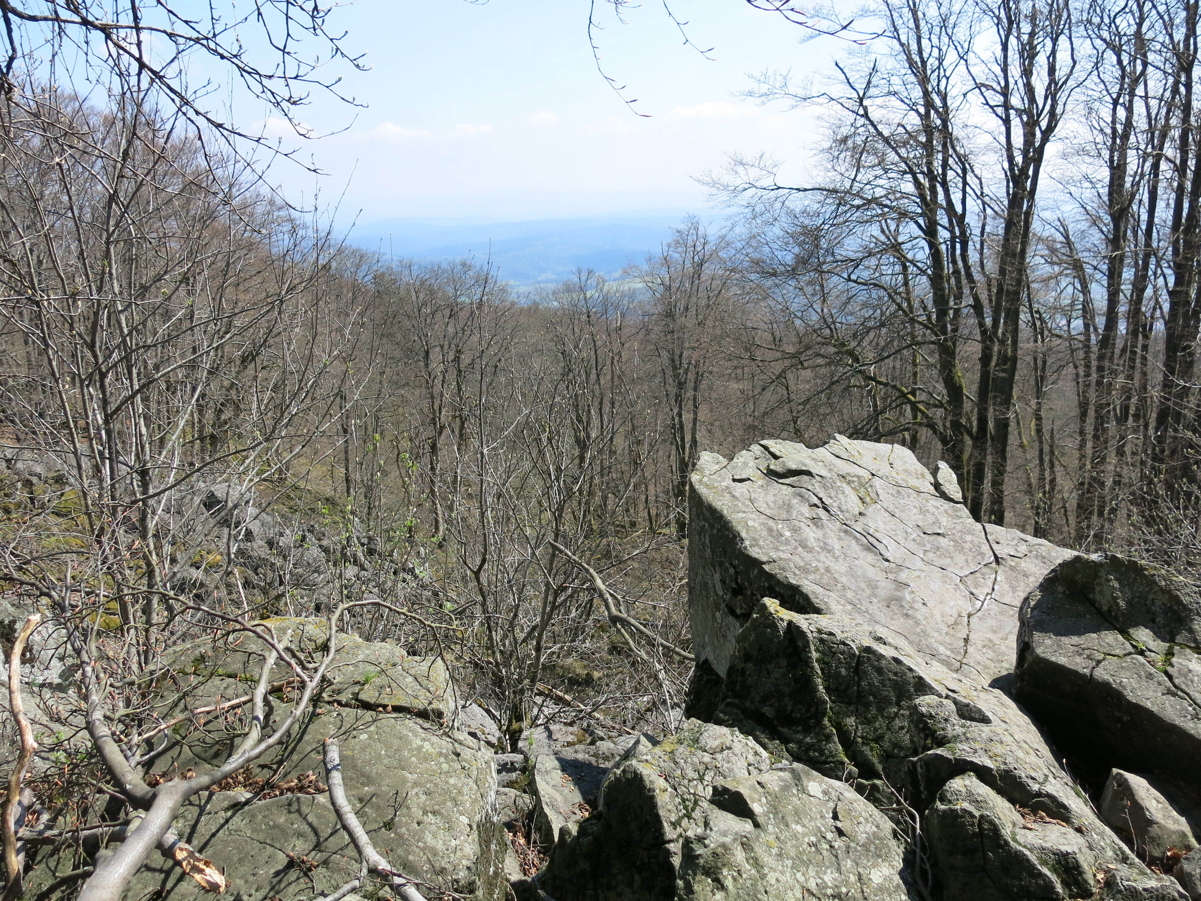 Geotop Basaltblockmeer Johannisfeuer am Kreuzberg